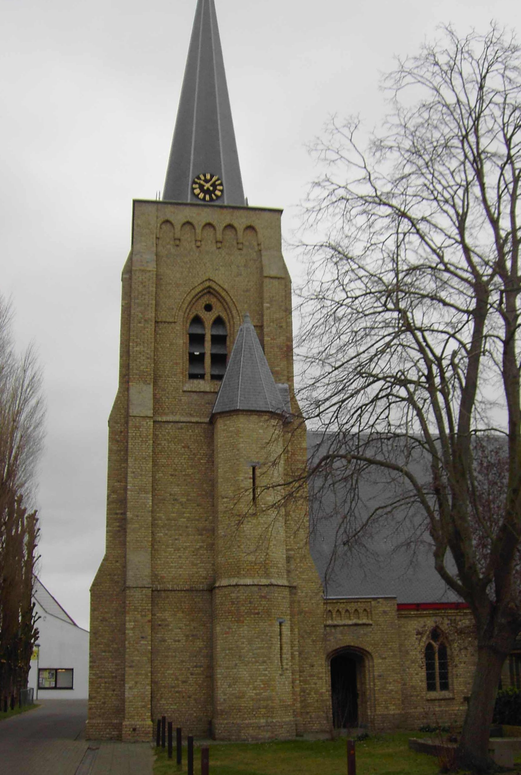 De parochiekerk Sint Georgius in Sint-Joris